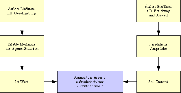 Schema der Arbeitszufriedenheit nach A. Bruggemann